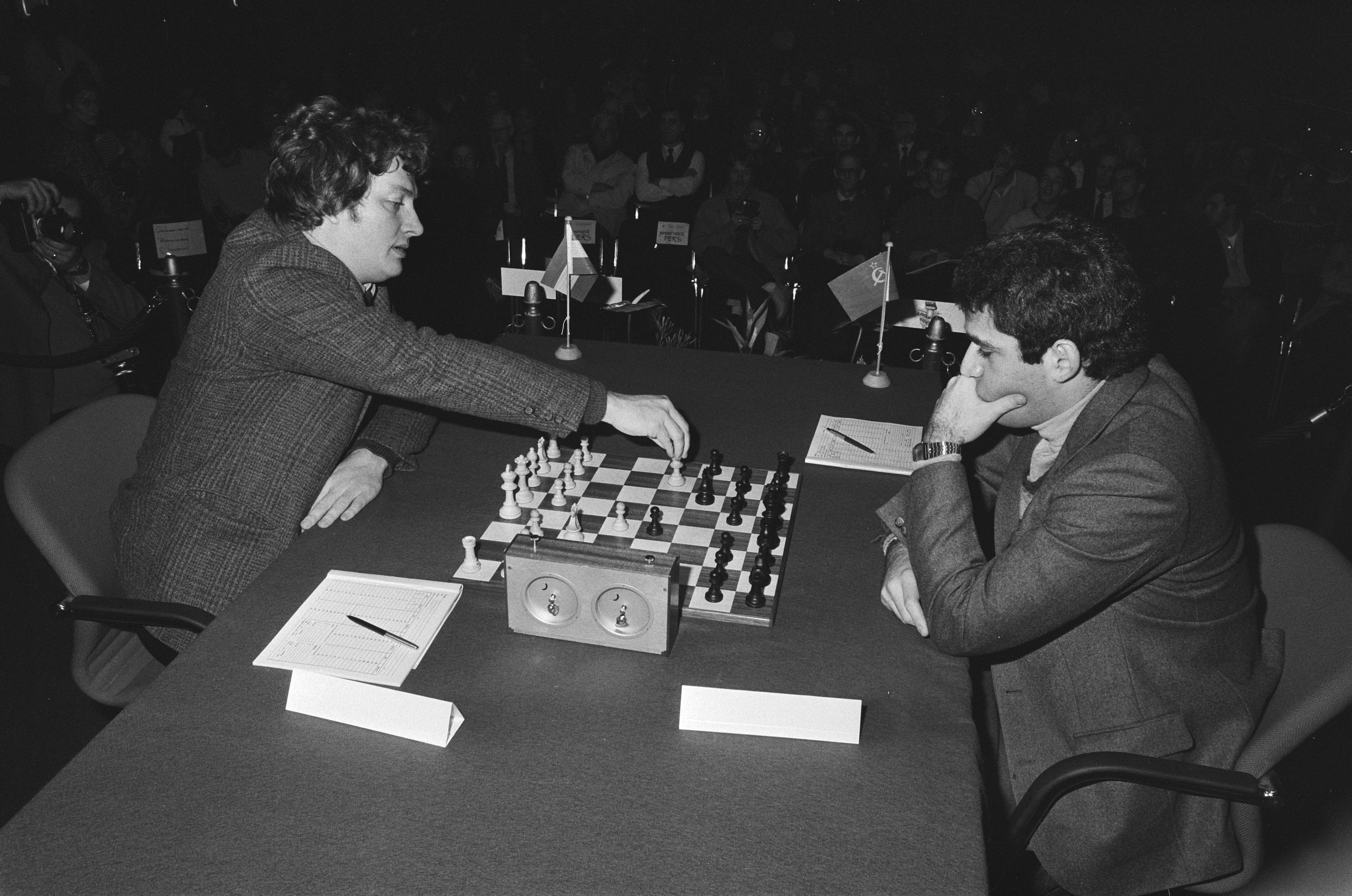 Collectie / Archief : Fotocollectie Anefo Reportage / Serie : [ onbekend ] Beschrijving : KRO schaaktweekamp Timman (l) tegen Kasparov (r) Datum : 17 december 1985 Trefwoorden : schaken, sport Persoonsnaam : Kasparov Garri, Timman, Jan Instellingsnaam : KRO Fotograaf : Bogaerts, Rob / Anefo Auteursrechthebbende : Nationaal Archief Materiaalsoort : Negatief (zwart/wit) Nummer archiefinventaris : bekijk toegang 2.24.01.05 Bestanddeelnummer : 933-5172